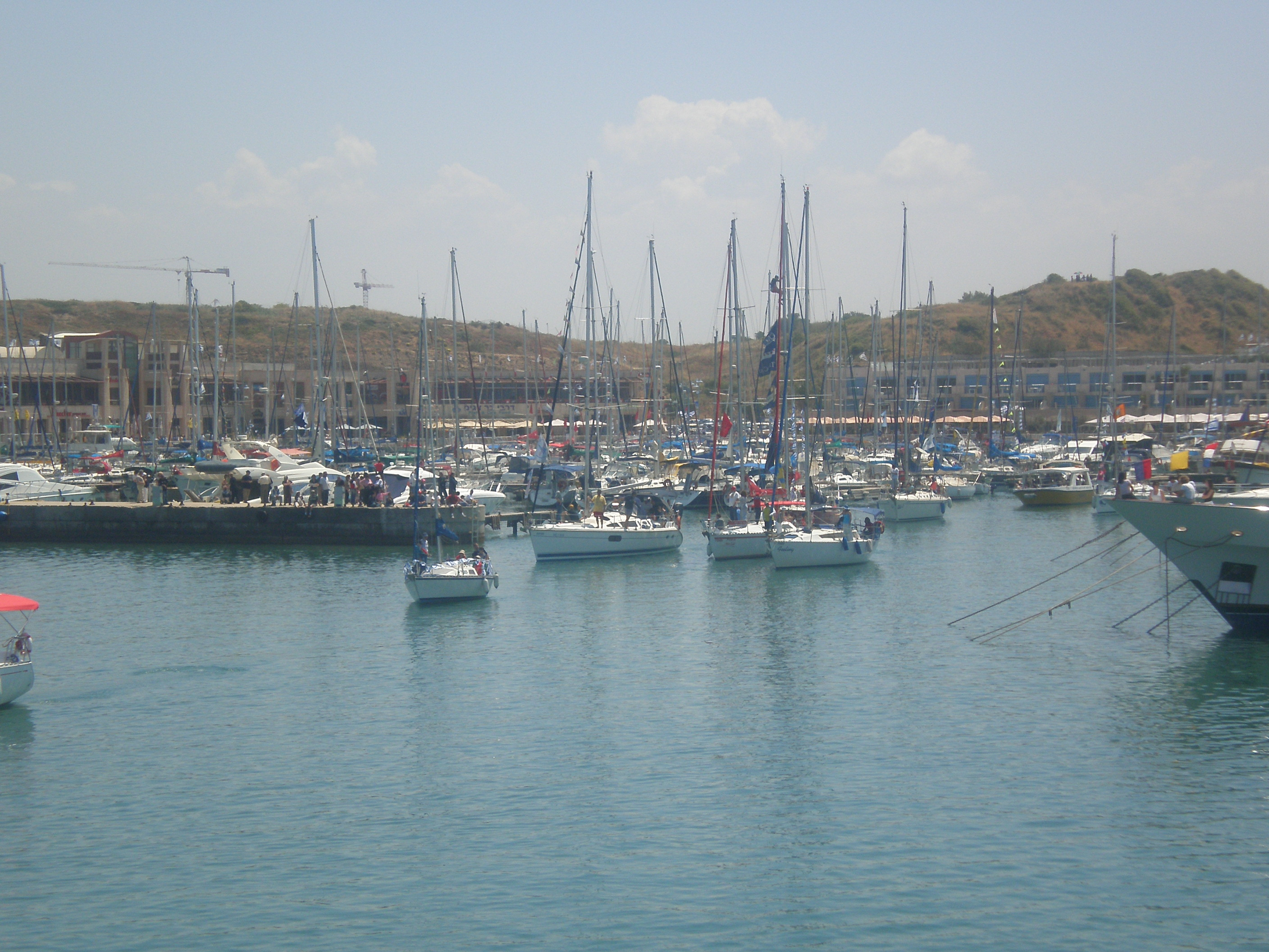 Marina of Herzliya, Israel